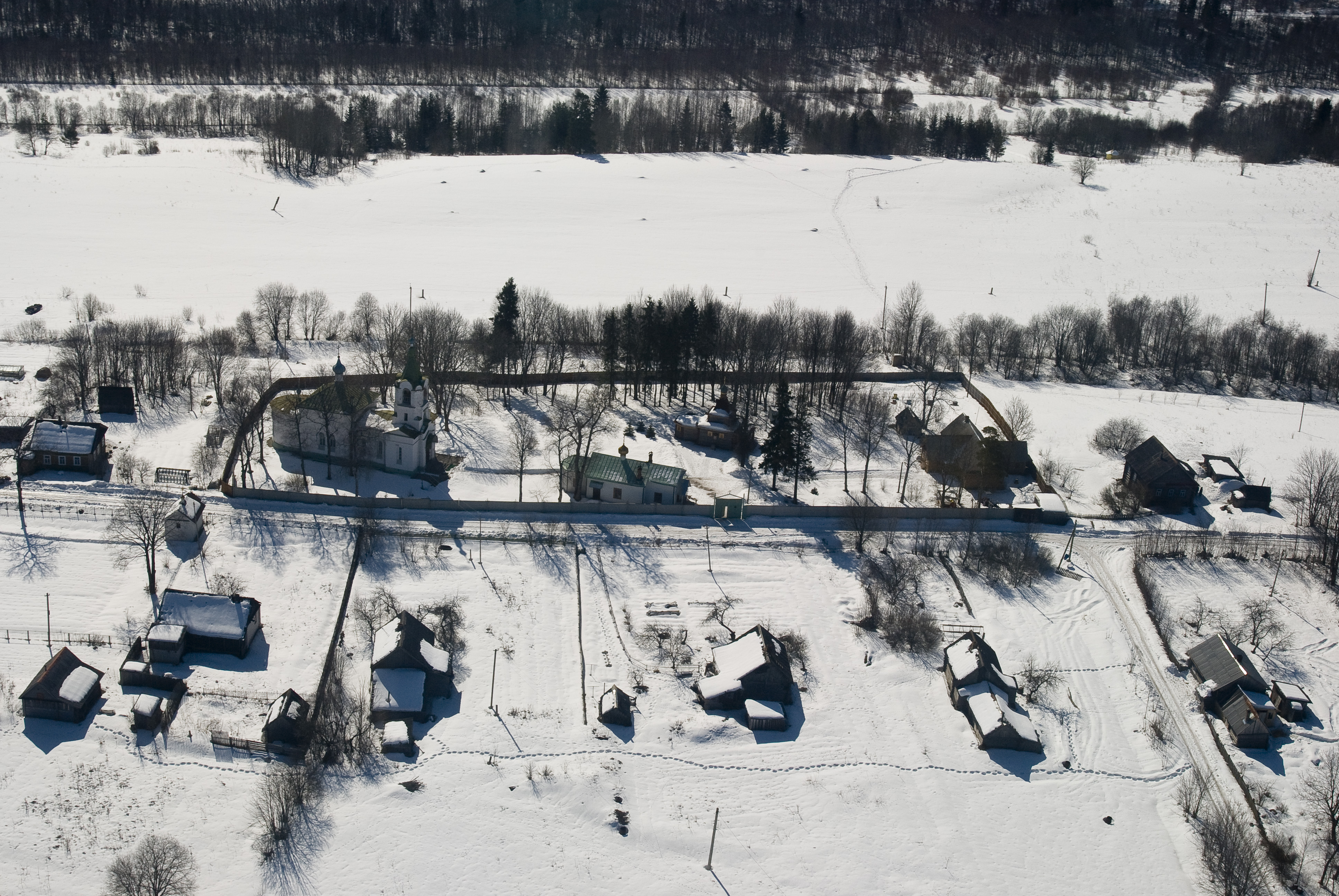 Деревня Сенно с высоты птичьего полета